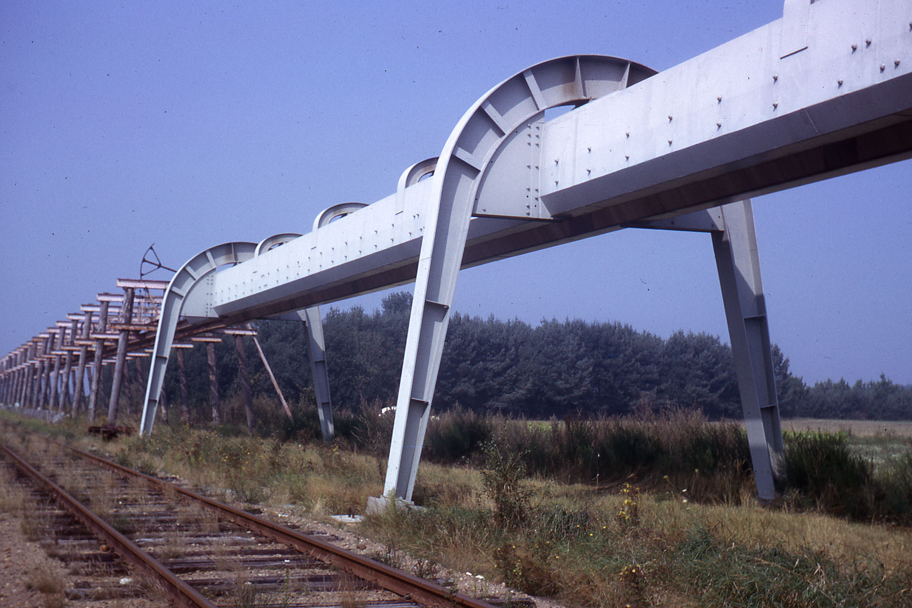 Voie expérimentale du SAFEGE à Châteauneuf-sur-Loire